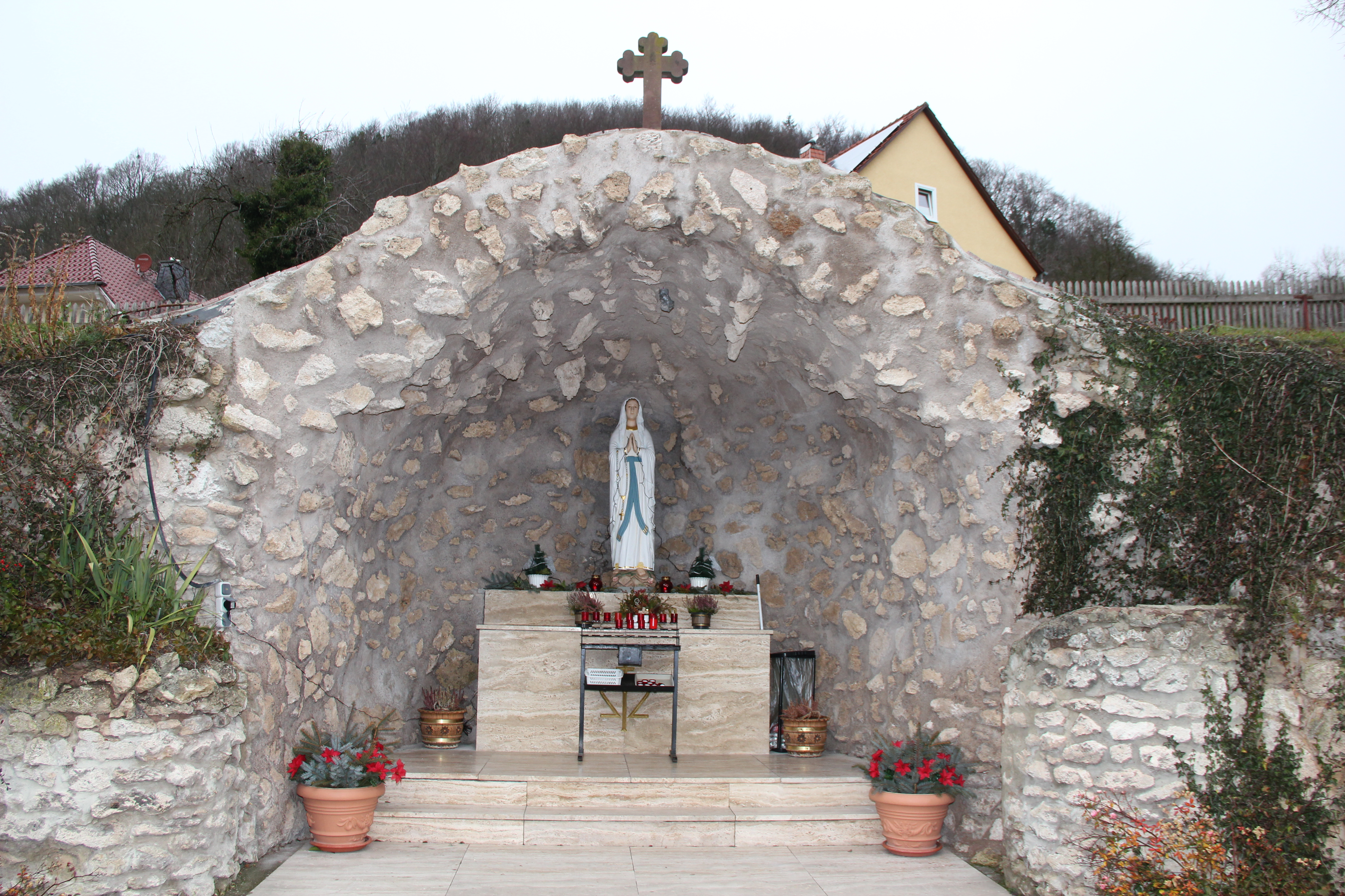 Mariengrotte in Marth